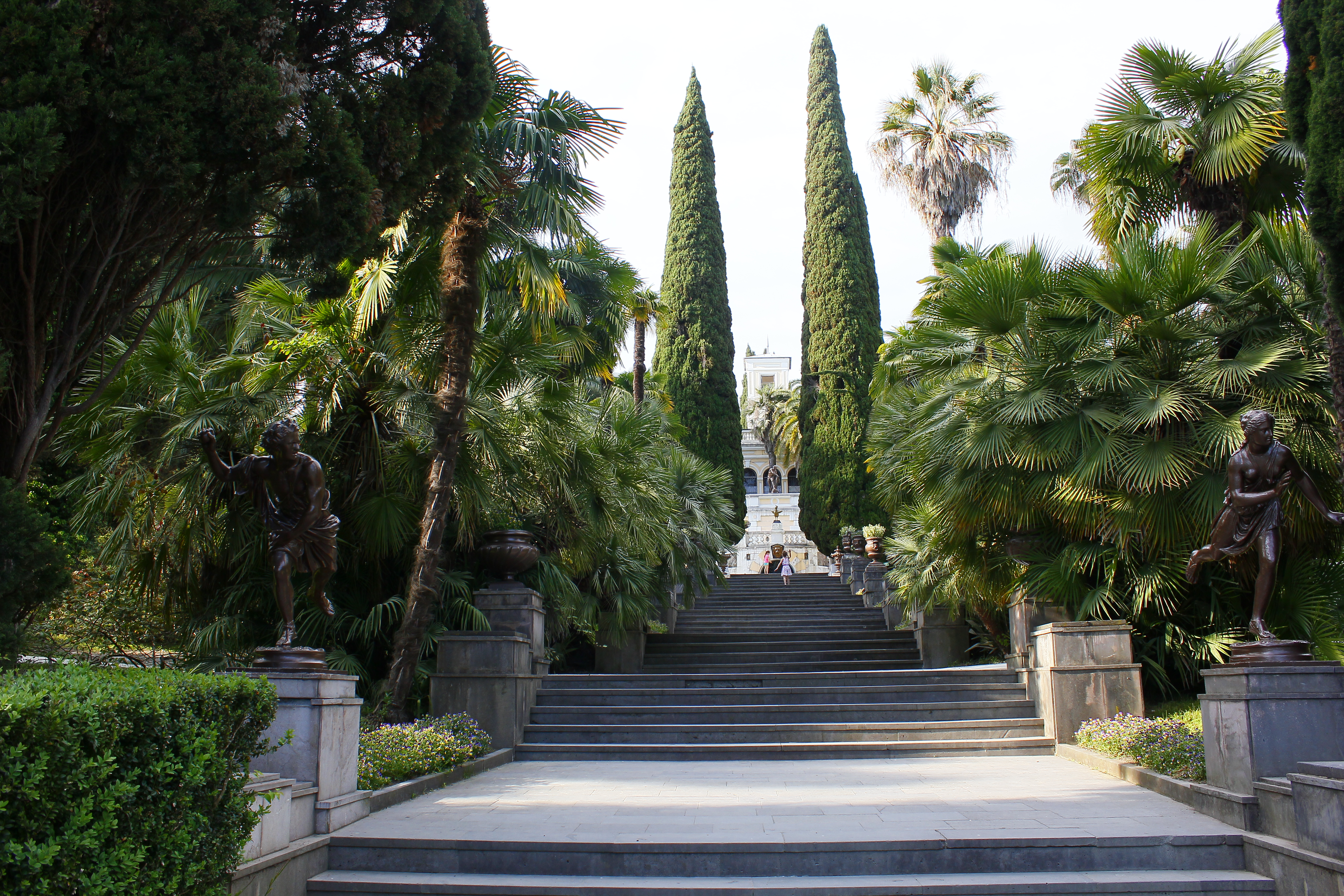 Парк «Дендрарий» с садовопарковой скульптурой и архитектурными сооружениями малых форм (Краснодарский край, Сочи, Курортный проспект, 74)